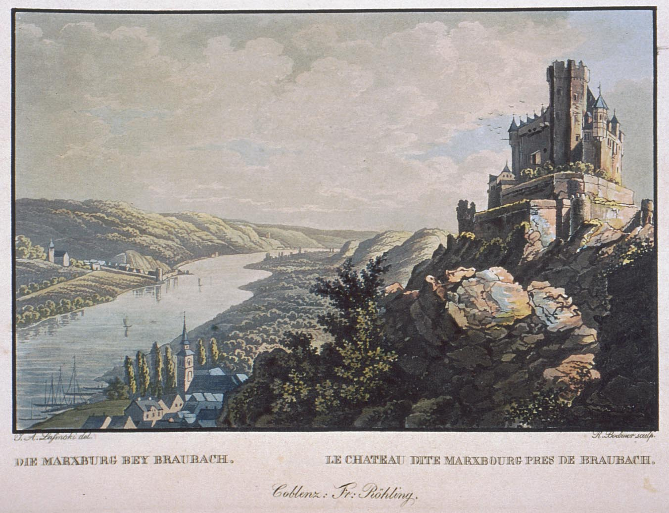 Altkolorierter Aquatintastich von R.Bodmer nach Vorlage von J.A. Lasinsky